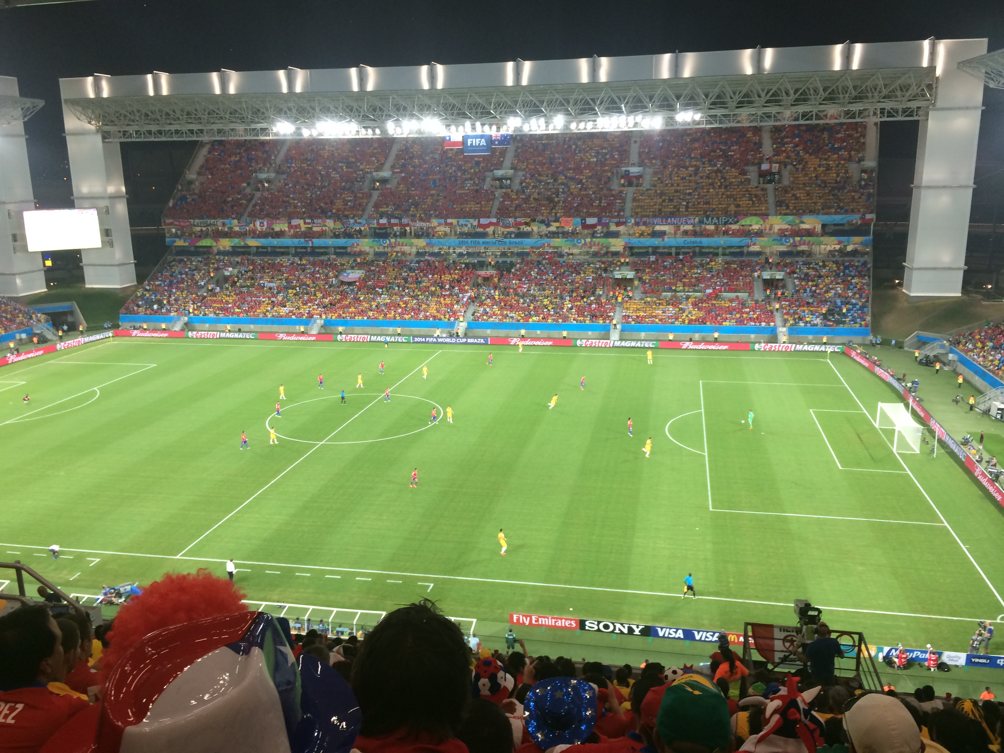 June 13, 2014